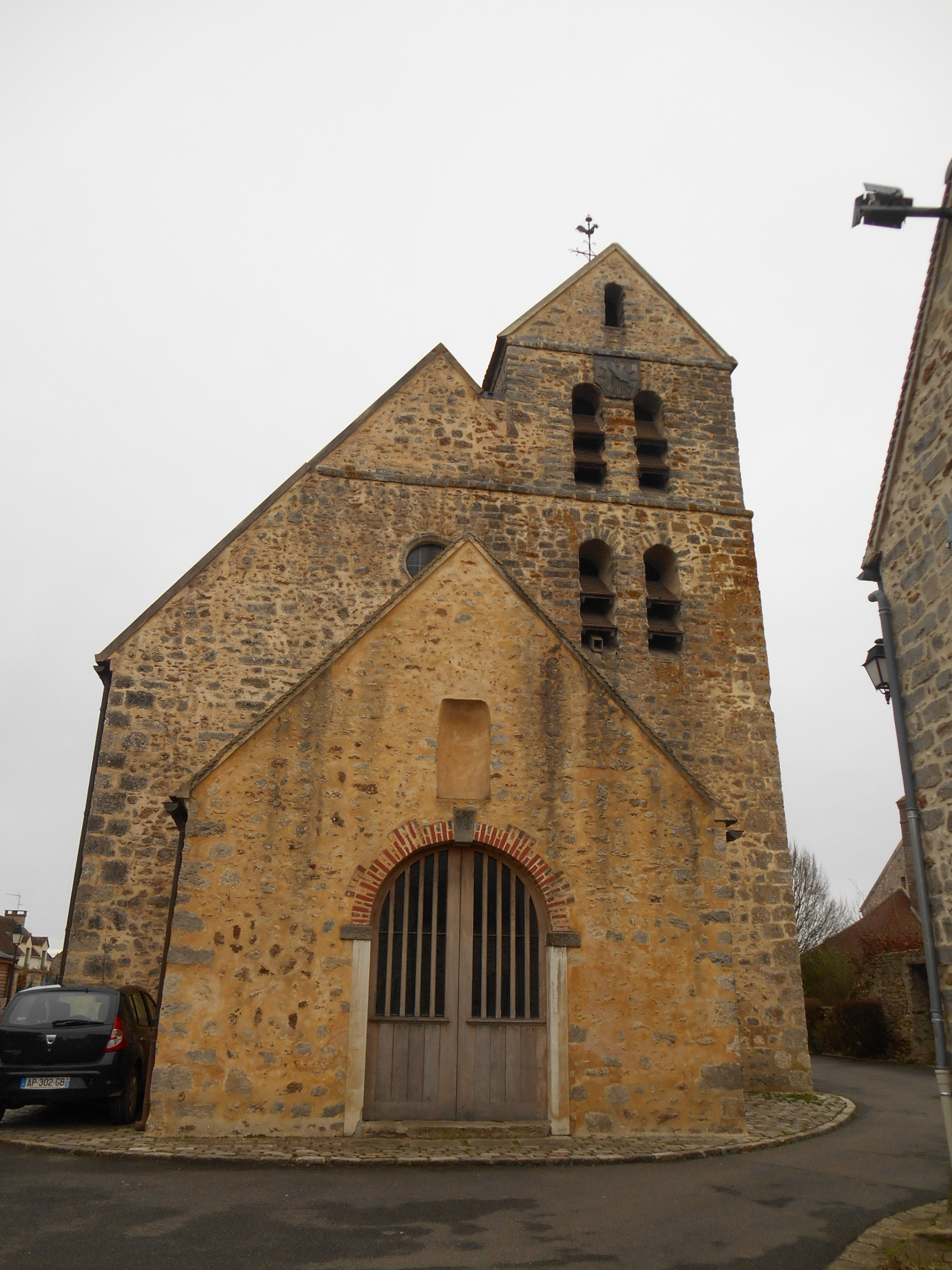 Eglise de Saint-Martin-en-Bière (77)